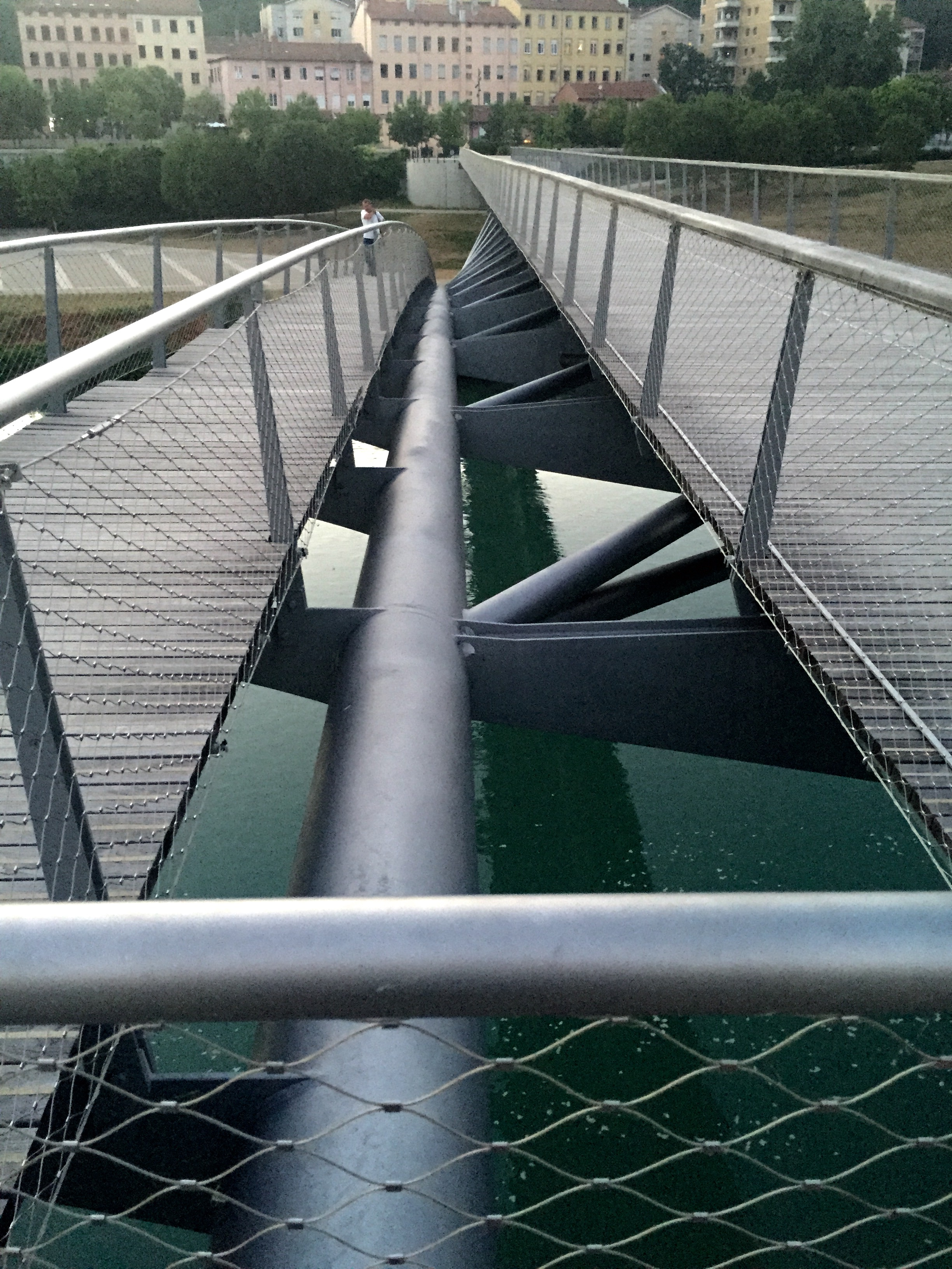 Passerelle de la Paix.